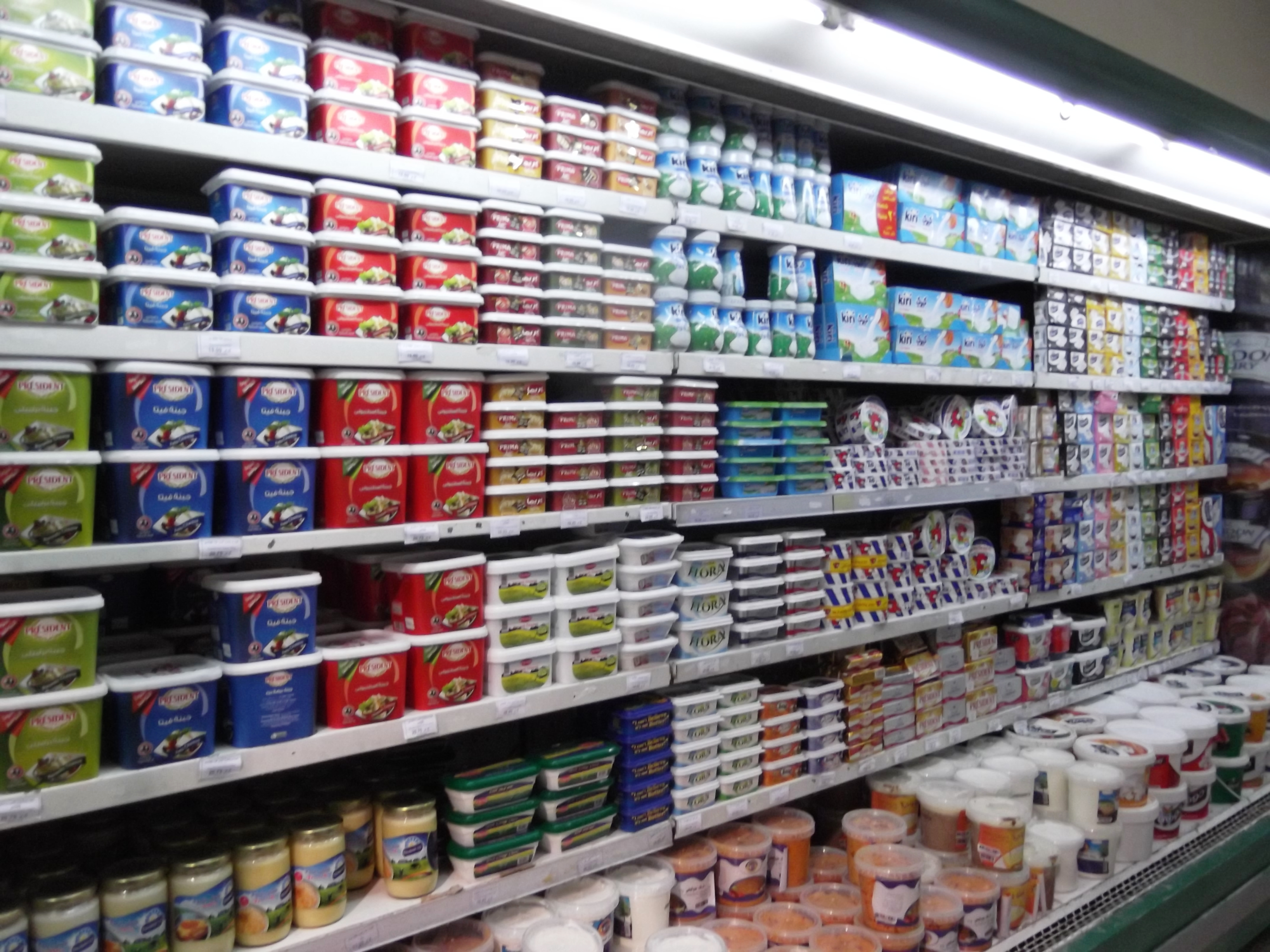 منتجات جبن متعددة داخل أحد المحال التجارية. This is an image of food from Egypt